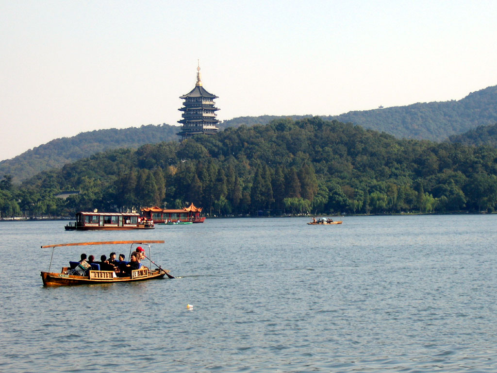 China Hangzhou Westlake